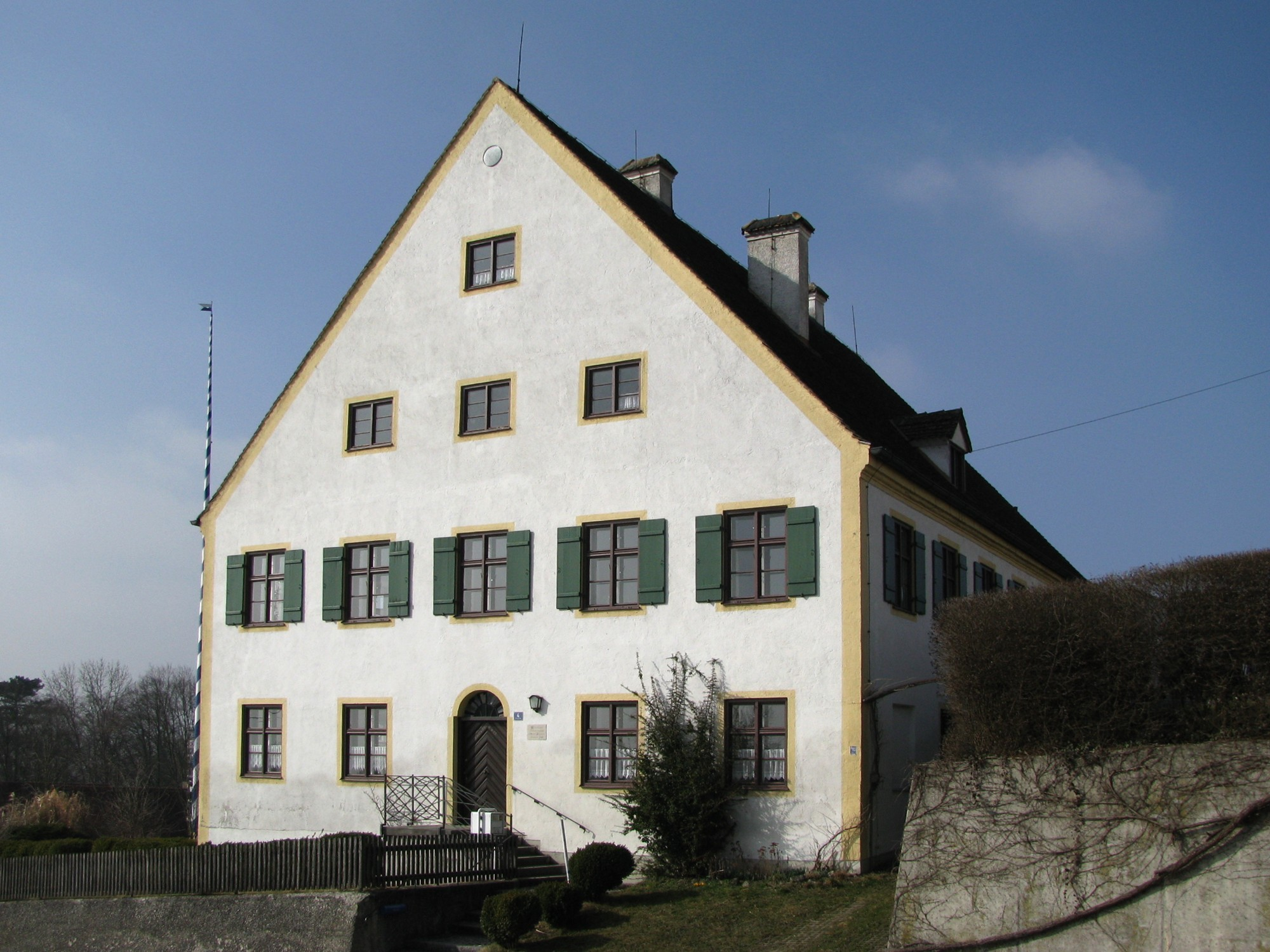 Pfarrhaus in Pähl, Ansicht von Süd-Ost